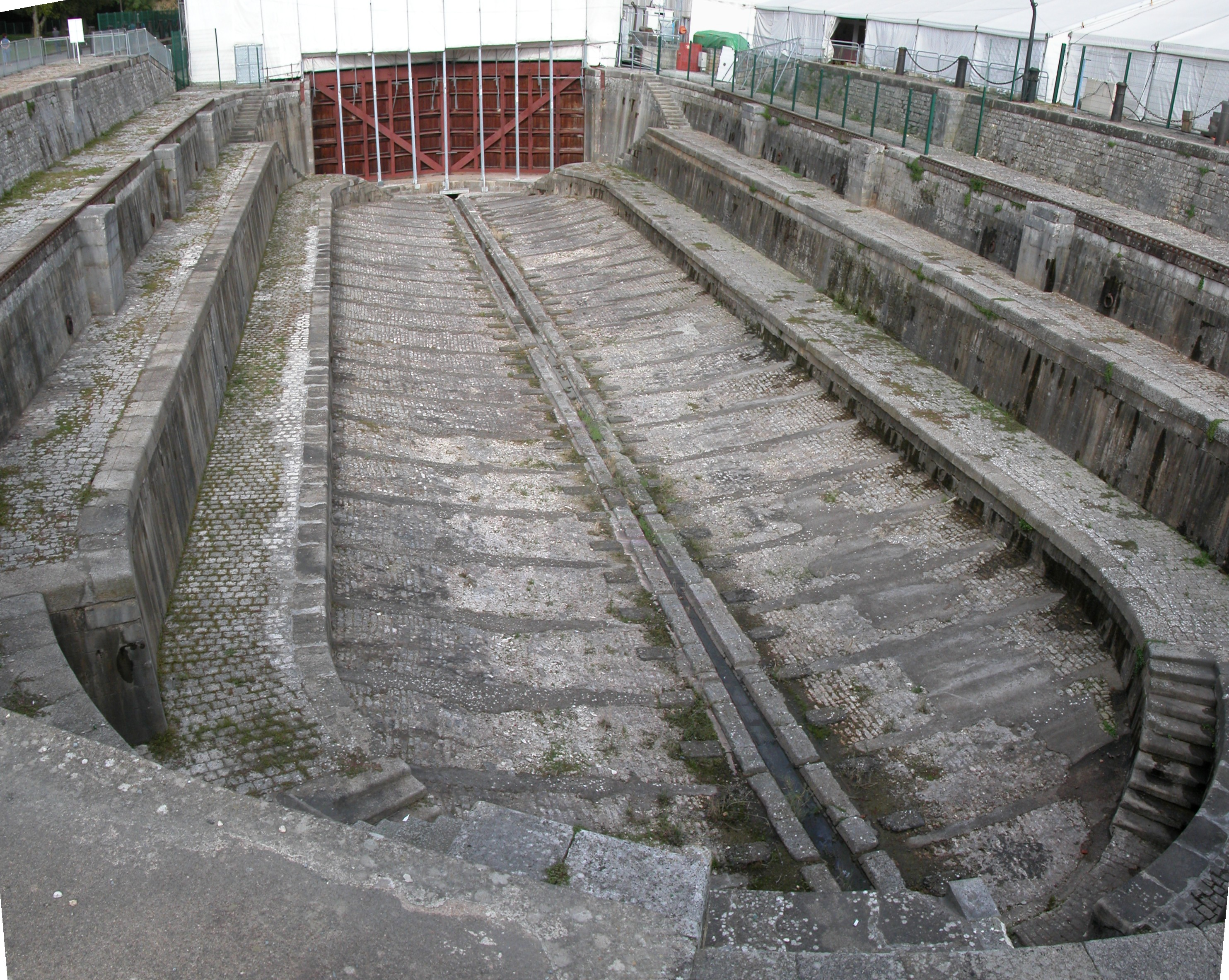 Forme de radoub à l'arsenal de Rochefort - Photo personnelle prise en septembre 2006.